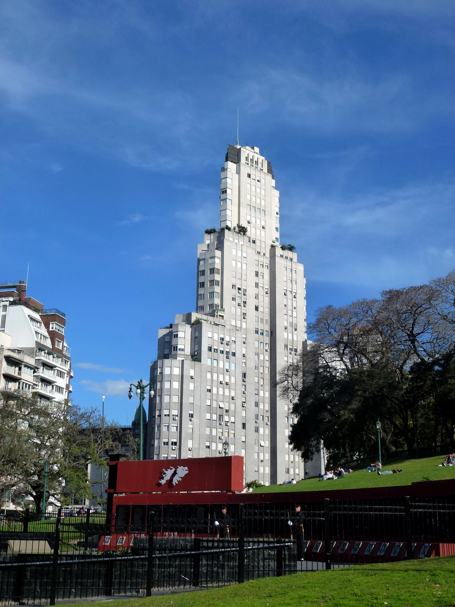 Edificio Kavanagh